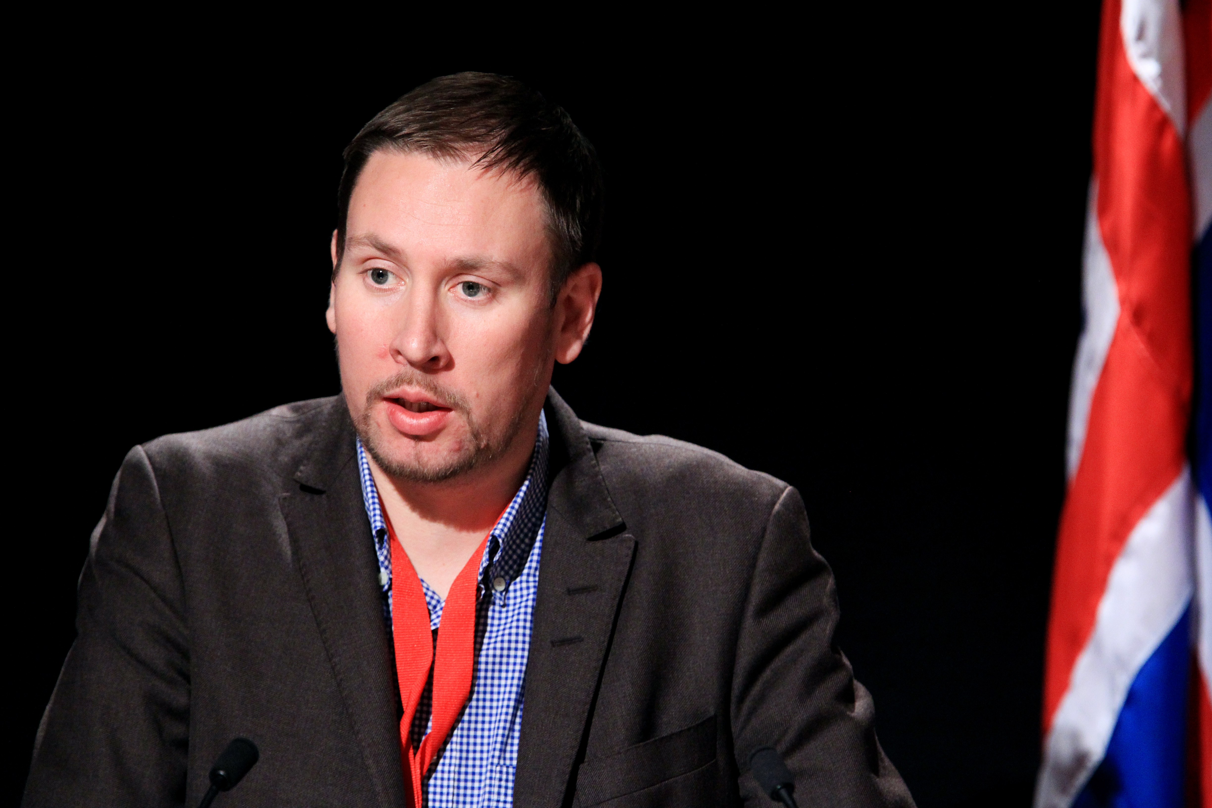 Paavo Arhinmäki vid Nordiska Rådets session i Reykjavik. 2010-11-03.